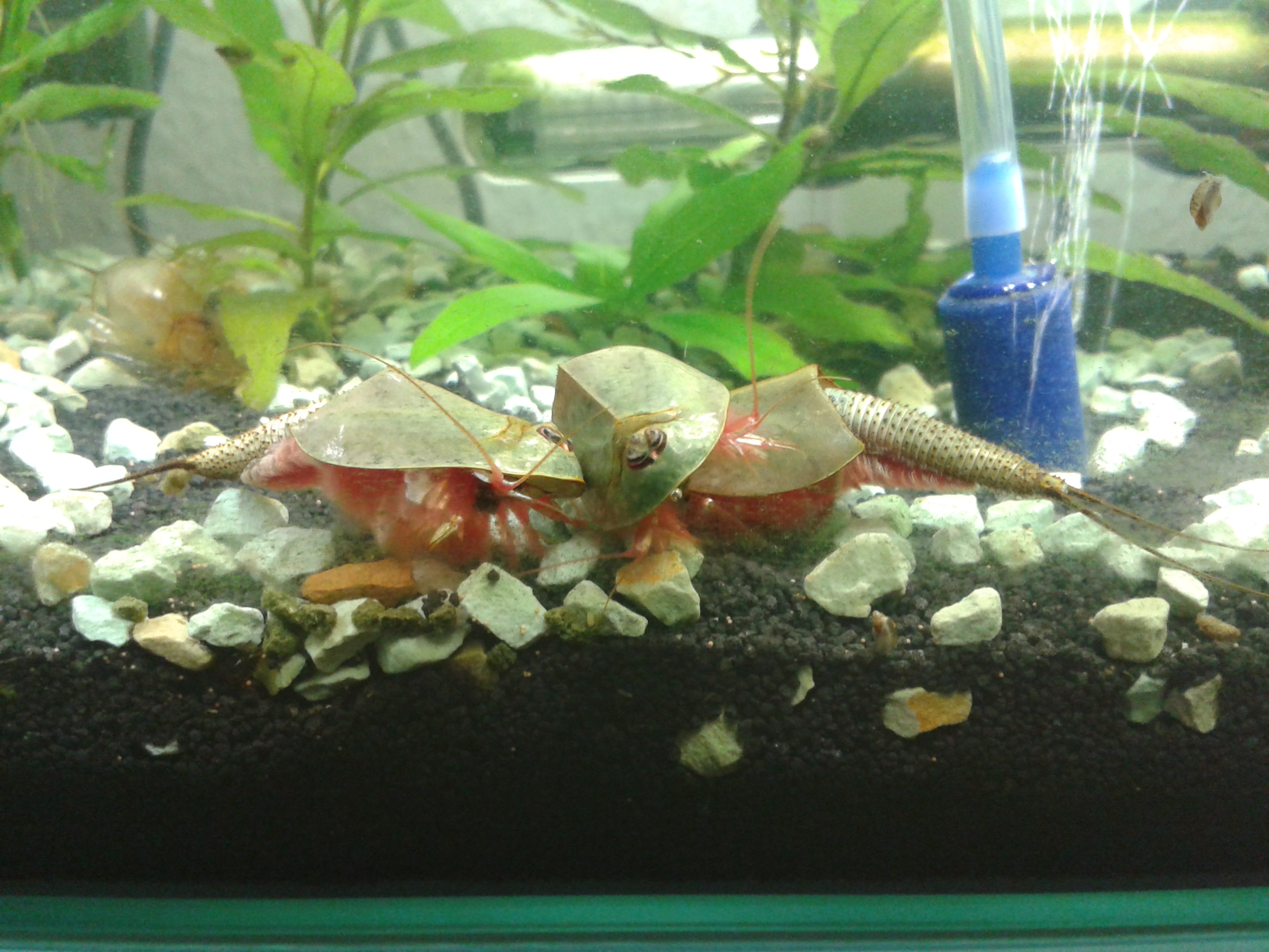 Drei Triops longicaudatus. Darunter die Dauereier im Bodengrund.